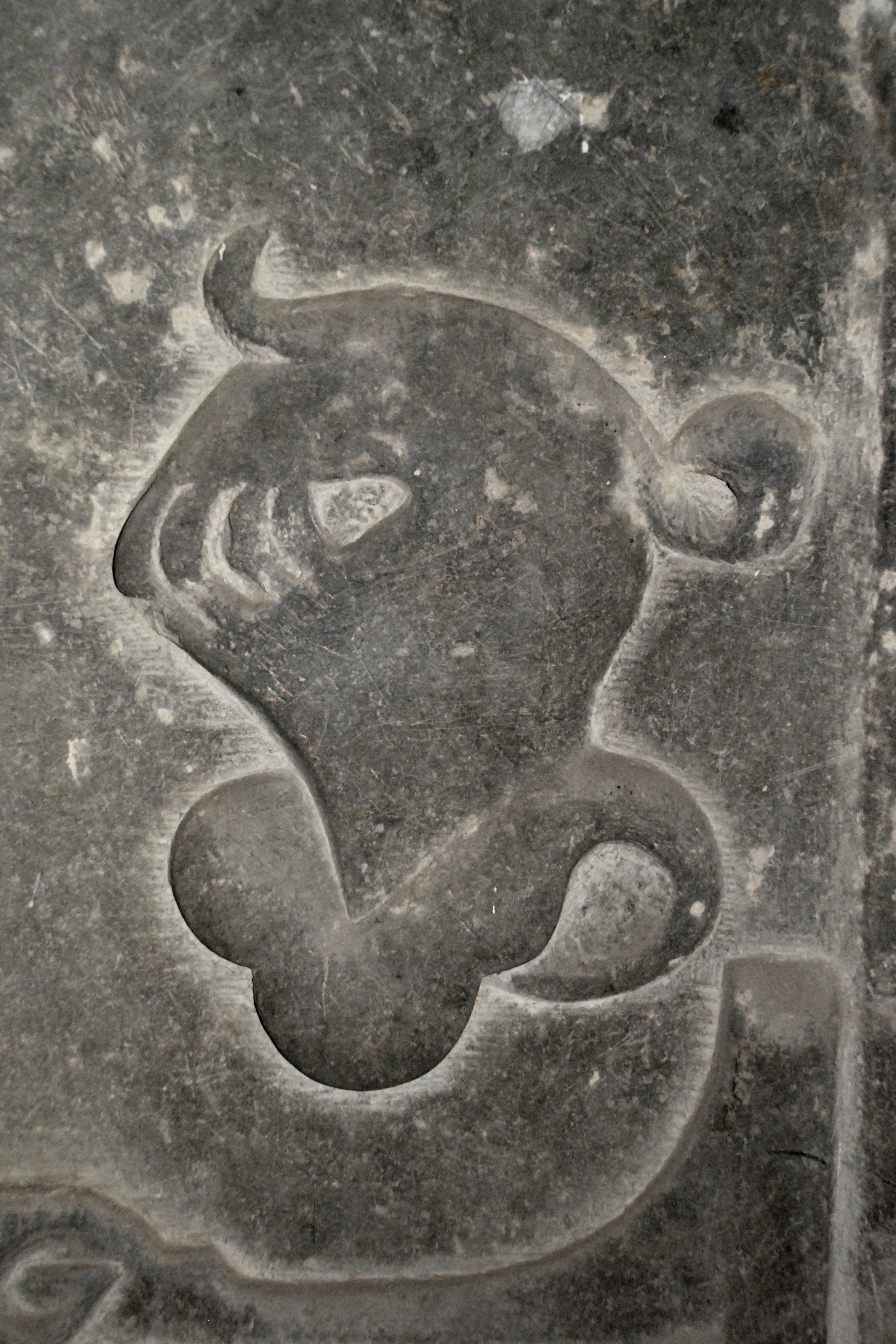 Belgique - Brabant wallon - Ways - Dalle funéraire de Philippe de Baisy